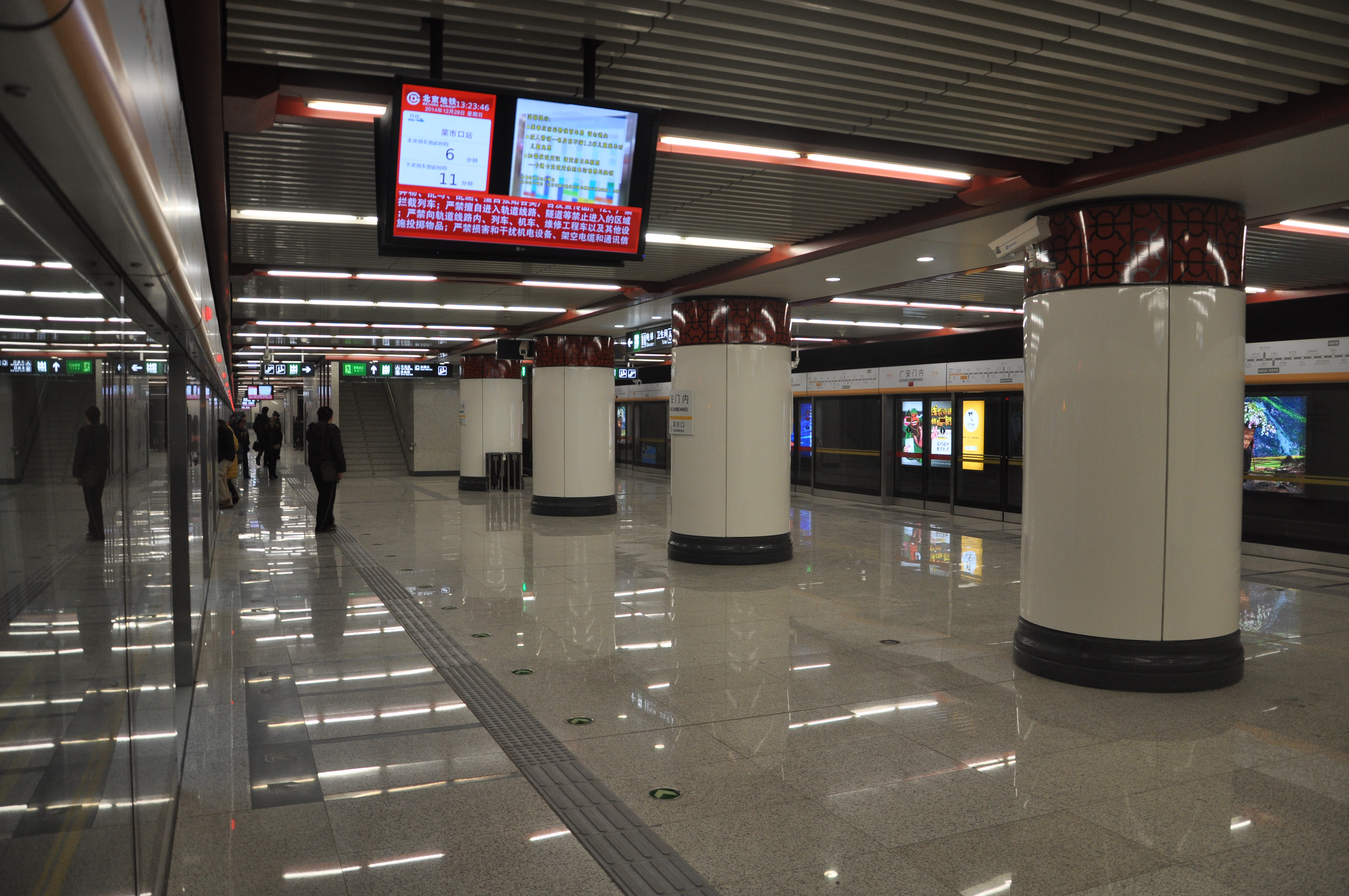 北京地铁7号线广安门内站站台